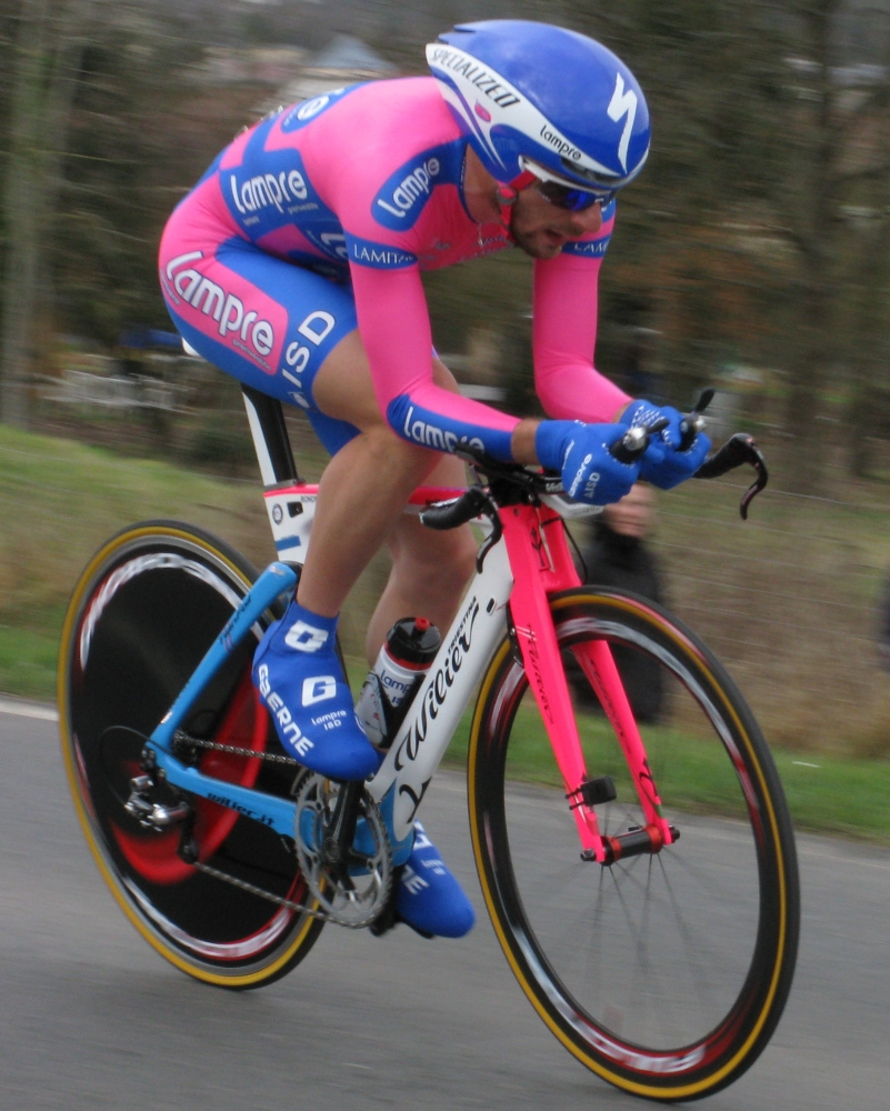 Matteo Bono